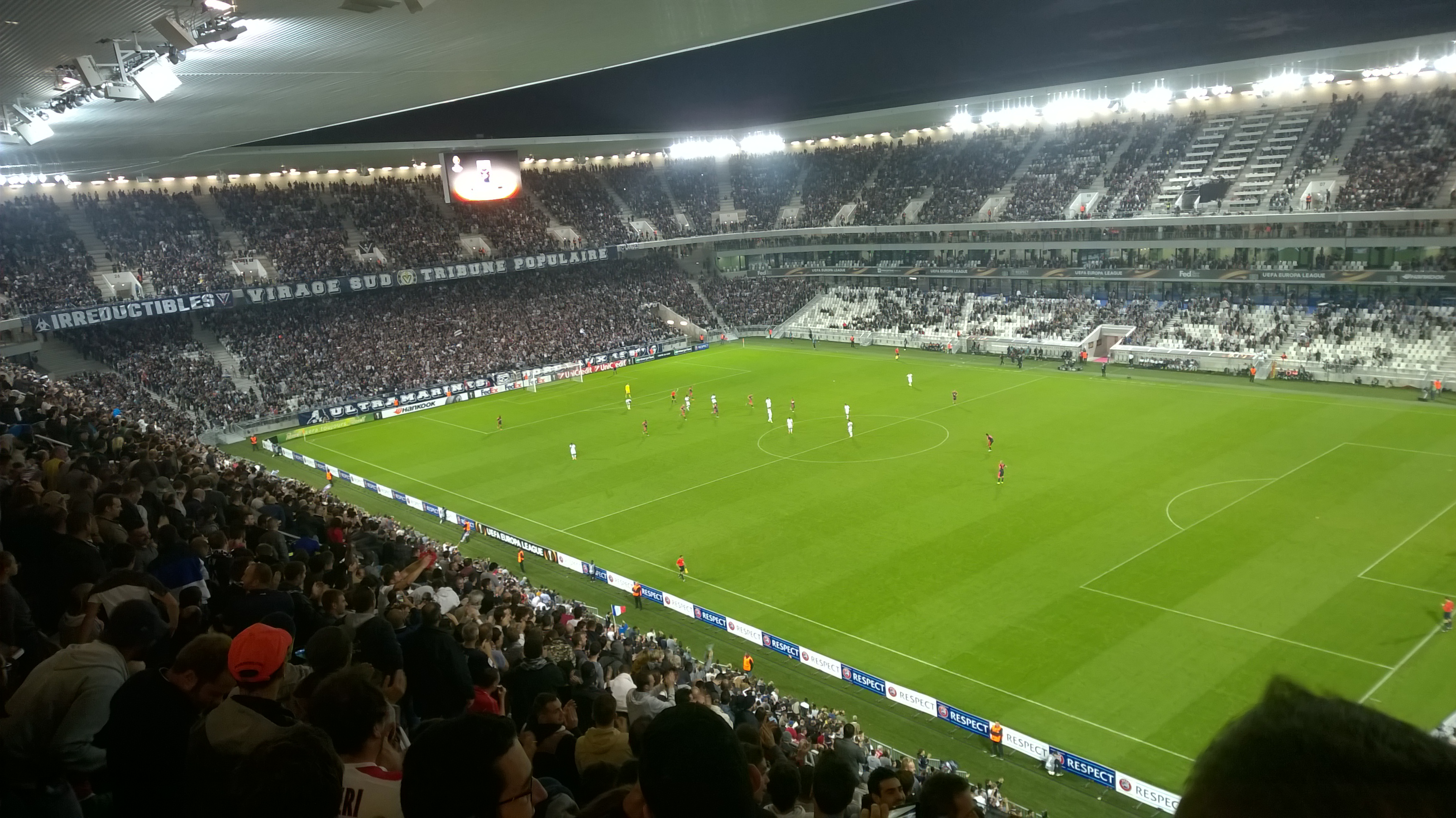 Match de football entre les Girondins de Bordeaux et le Liverpool FC comptant pour la Ligue Europa au stade MATMUT Atlantique le 17 septembre 2015.